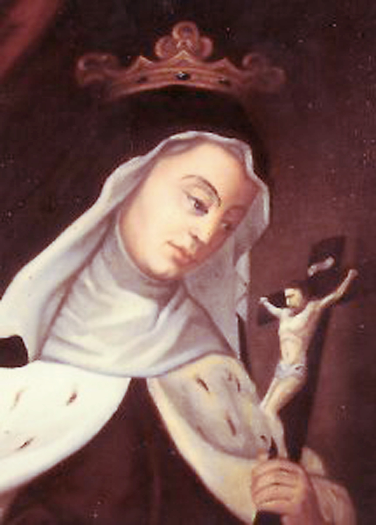 Portrait de la Bienheureuse Françoise d'Amboise - portant l'habit de religieuse ainsi que la couronne et le camail d'hermine signifiant son rang de duchesse de Bretagne.